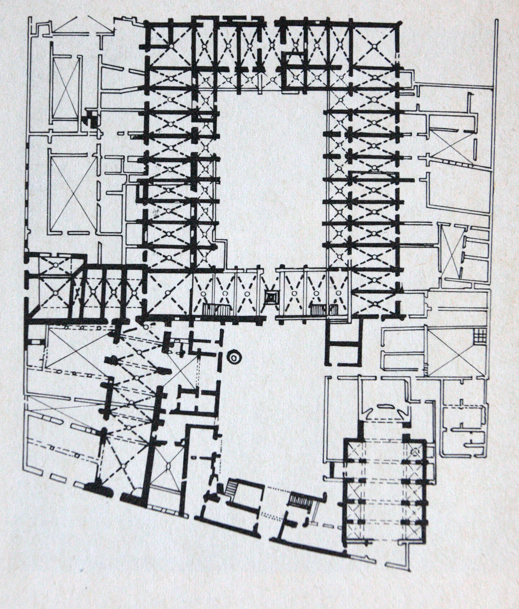 Plànol de l'Hospital de la Santa Creu (Barcelona)